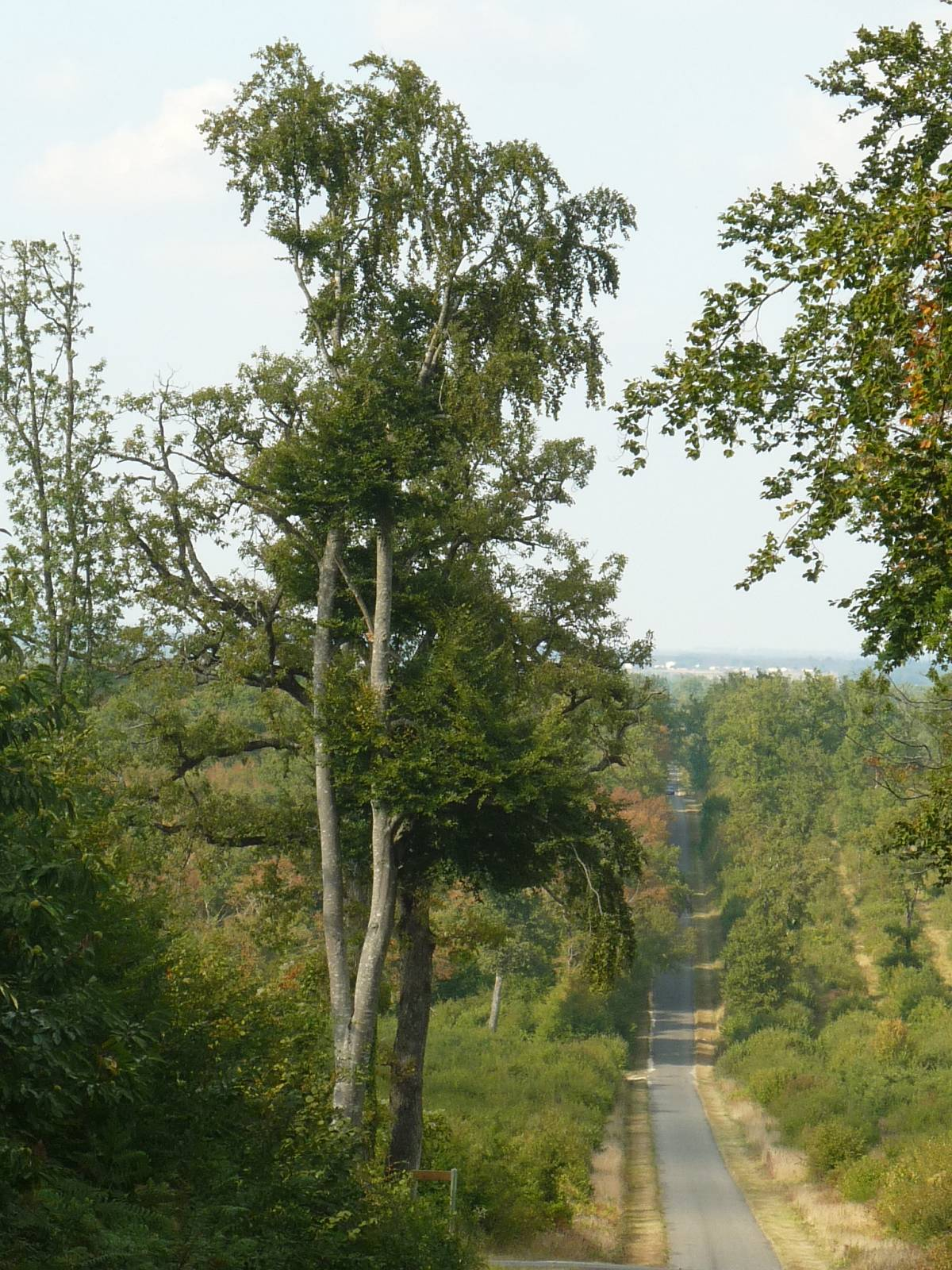 route forestière du Lac Français, forêt de la Braconne (16), France